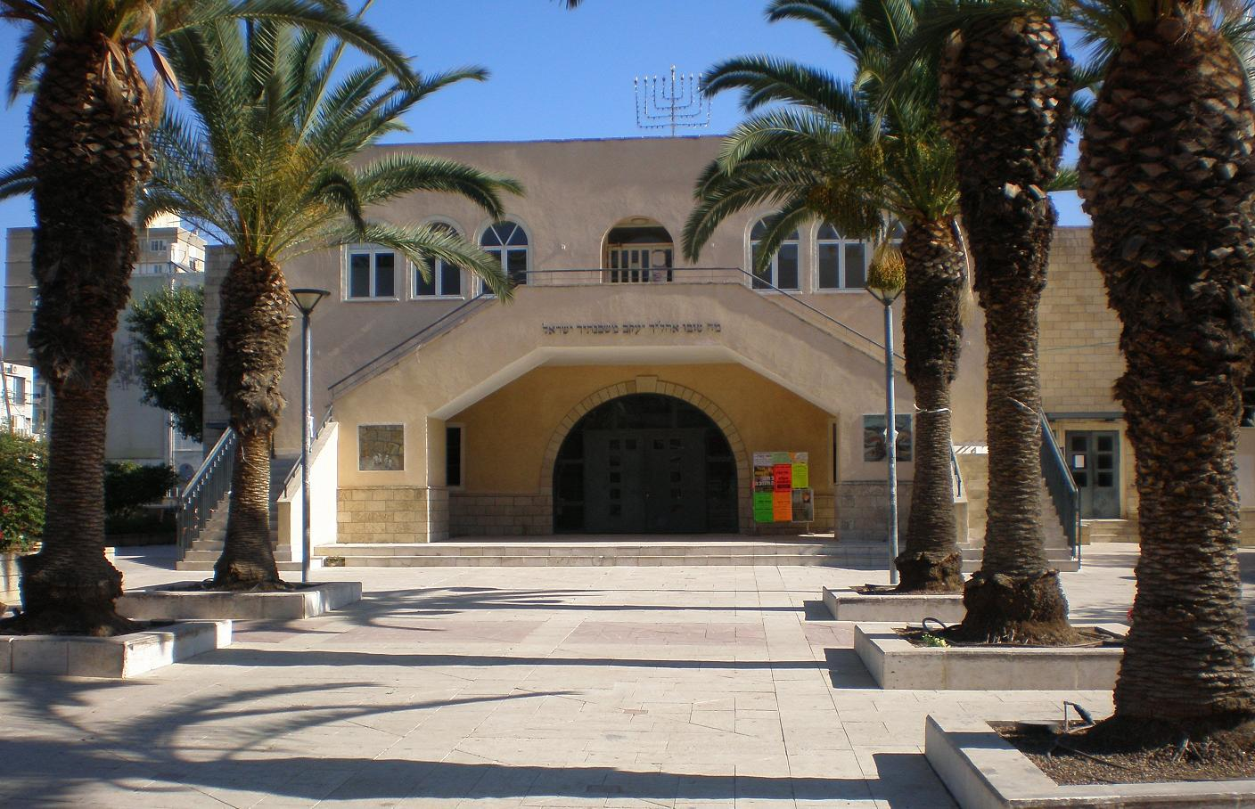 בית הכנסת הגדול בהרצליה, ברחוב בן-גוריון פינת סוקולוב. צילם דוד שי